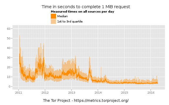 Evolution chronologique du temps de chargement d'un fichier de 1MiB via Tor (données consultées le 11/04/2016).